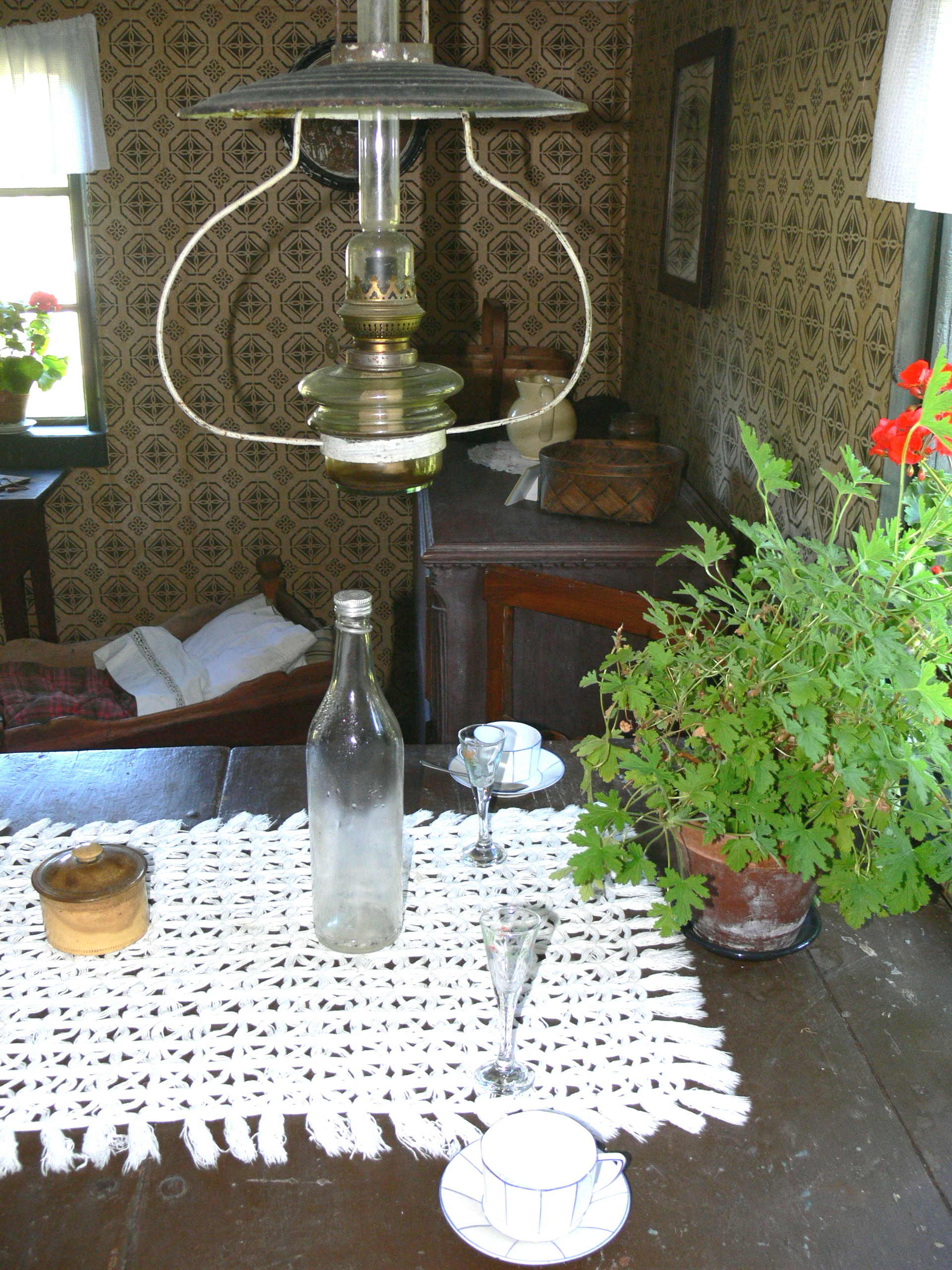 Bunge Museum auf Gotland. Hof ( 19.Jhdt. ): Petroleumlampe über Esstisch